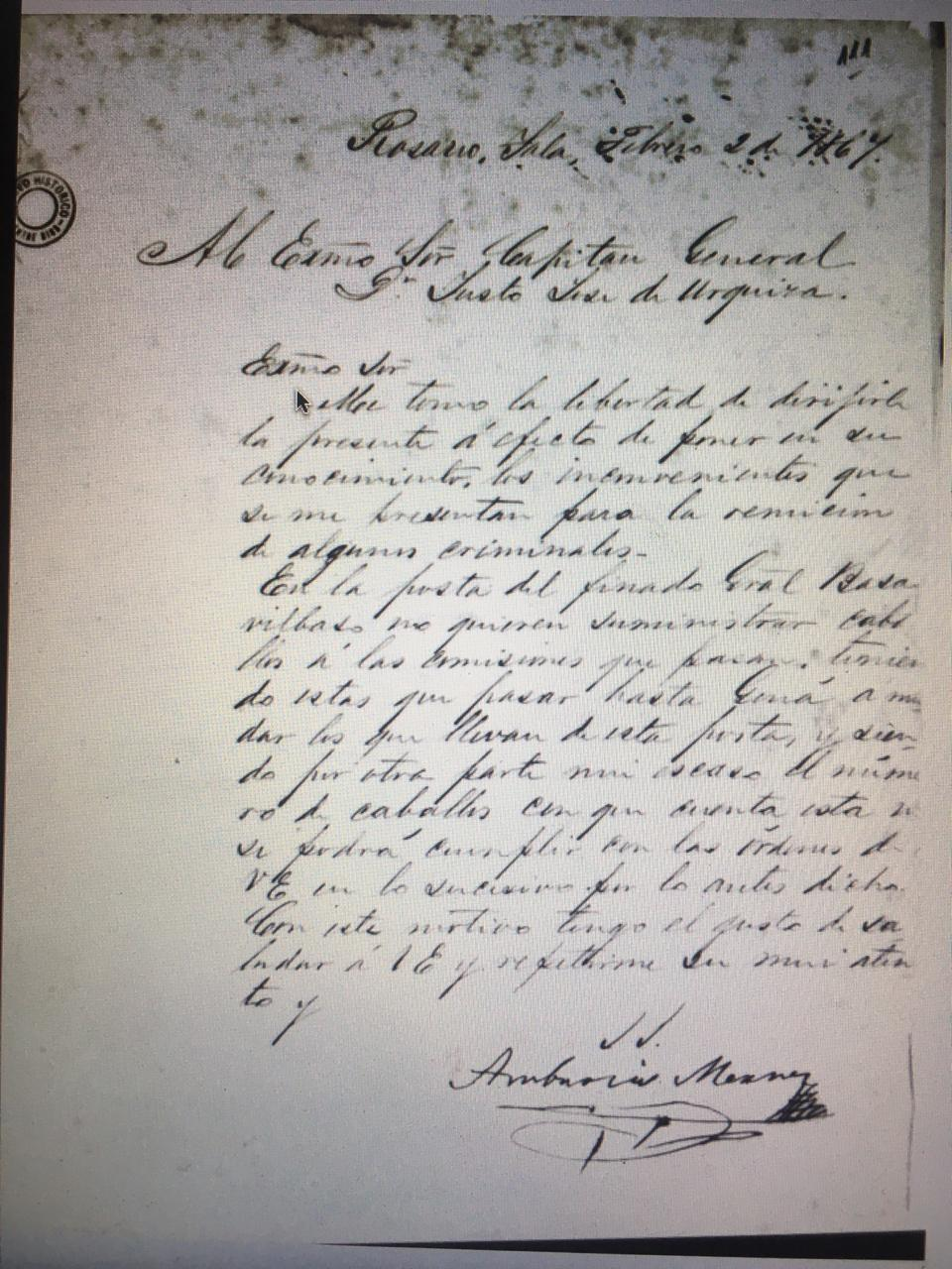 Es una carta de un militar argentino a otro, gobernador argentino en el siglo XIX.